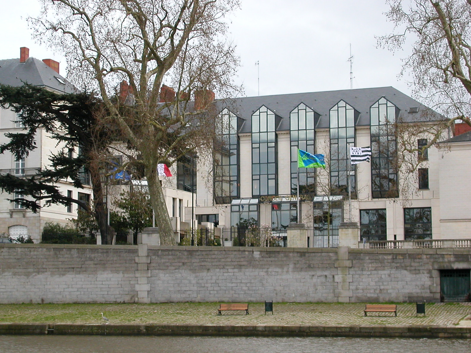 Bâtiment du Conseil général de la Loire-Atlantique, sur les bords de l'Erdre à Nantes